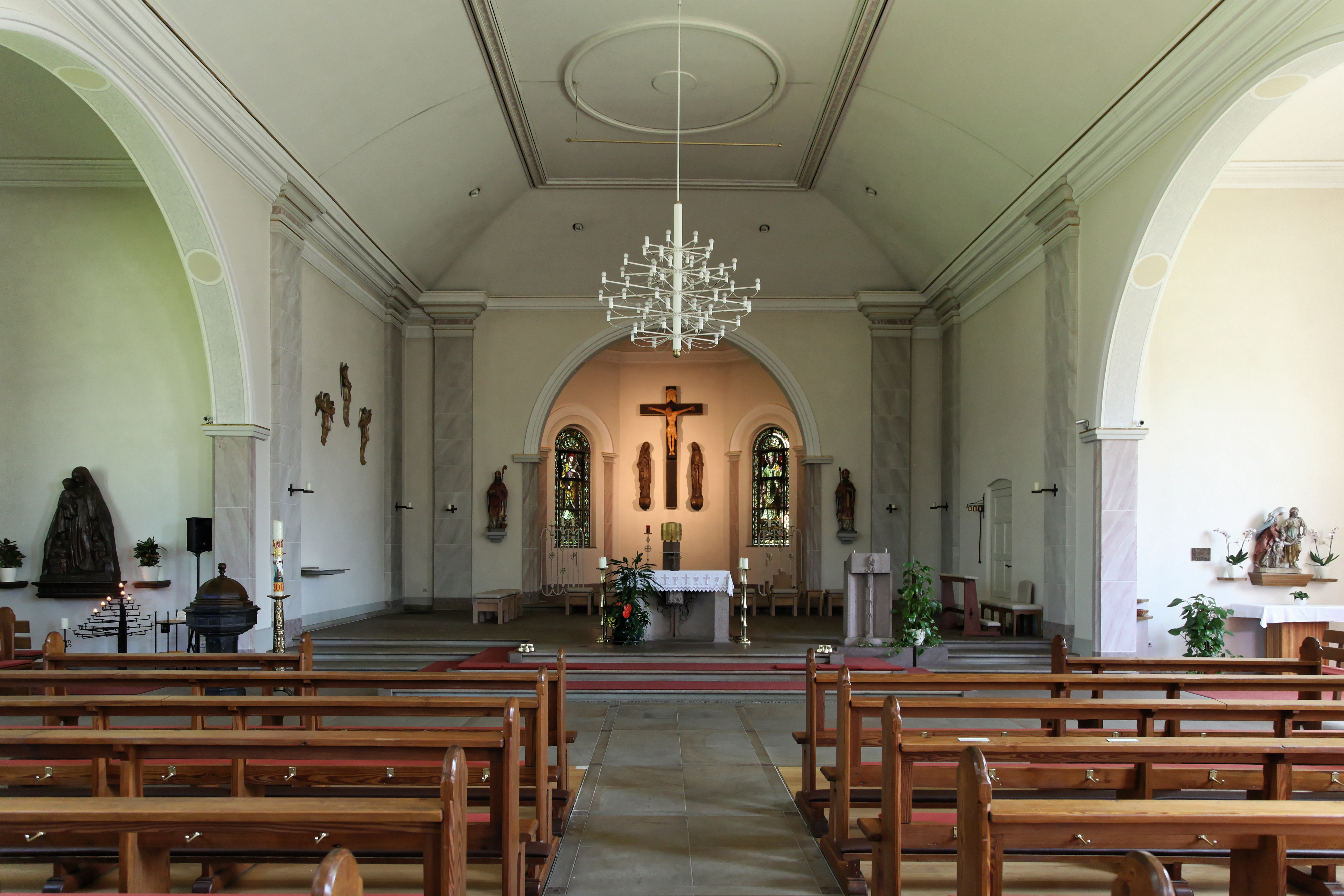 St. Bonifatius, Kirchstraße in Rhauderfehn